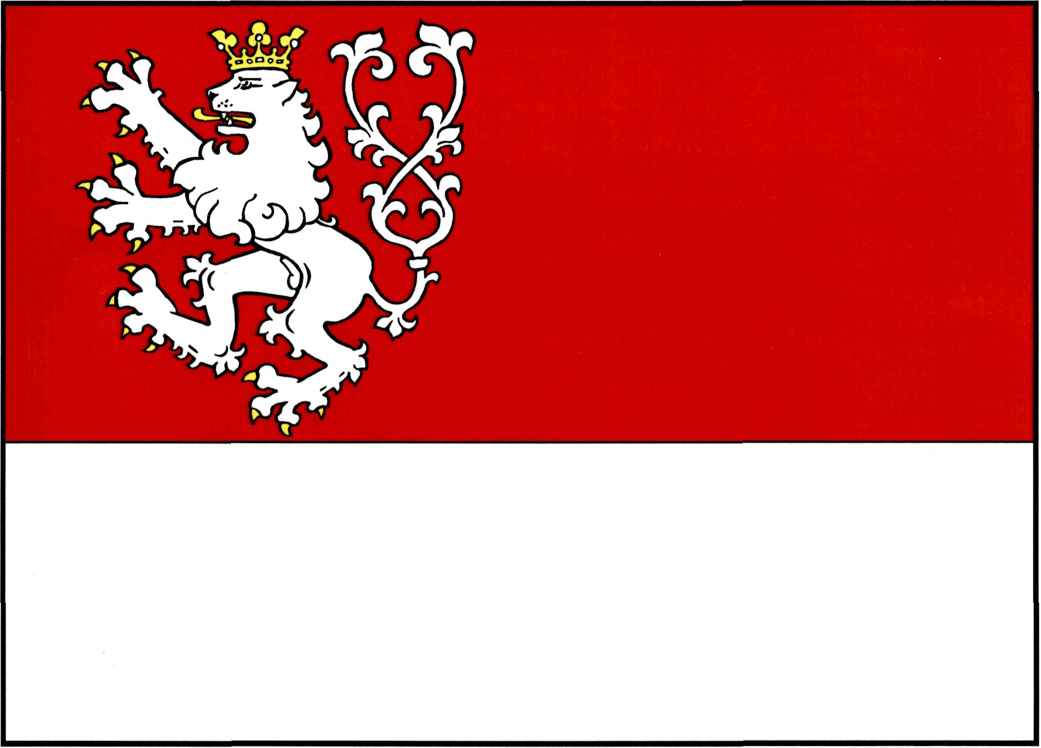 Vlajka obce Chotěboř